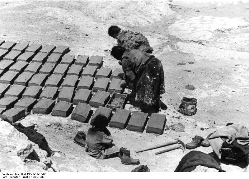 Schigatse, Ziegelstechen und Ziegeltrocknen